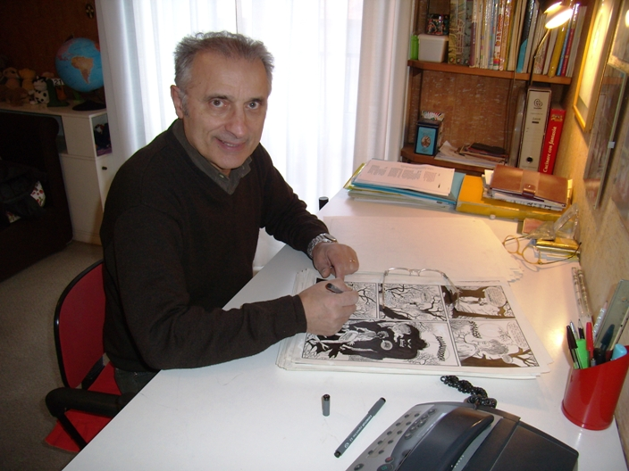 Il fumettista italiano Ernesto Grassani.